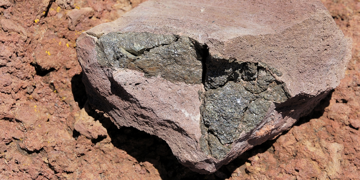 Иллюcтрация для викиуебника Гавайеведение